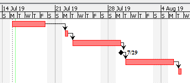 Um marco, quando colocado em softwares de gerenciamento de projeto, é feito como uma tarefa de tempo zero e aparece com uma notação especial (losango negro nesse caso).